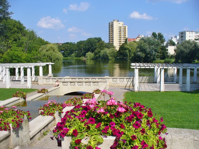 Charlottenburg - Lietzensee